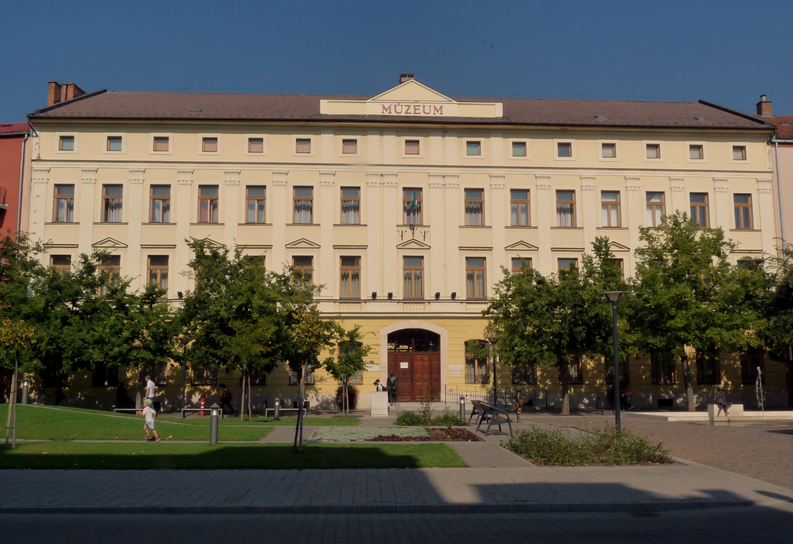 Magyar Király Szálloda (Damjanich János Múzeum) (Szolnok, Kossuth tér 4.) This is a photo of a monument in Hungary. Identifier: 6045